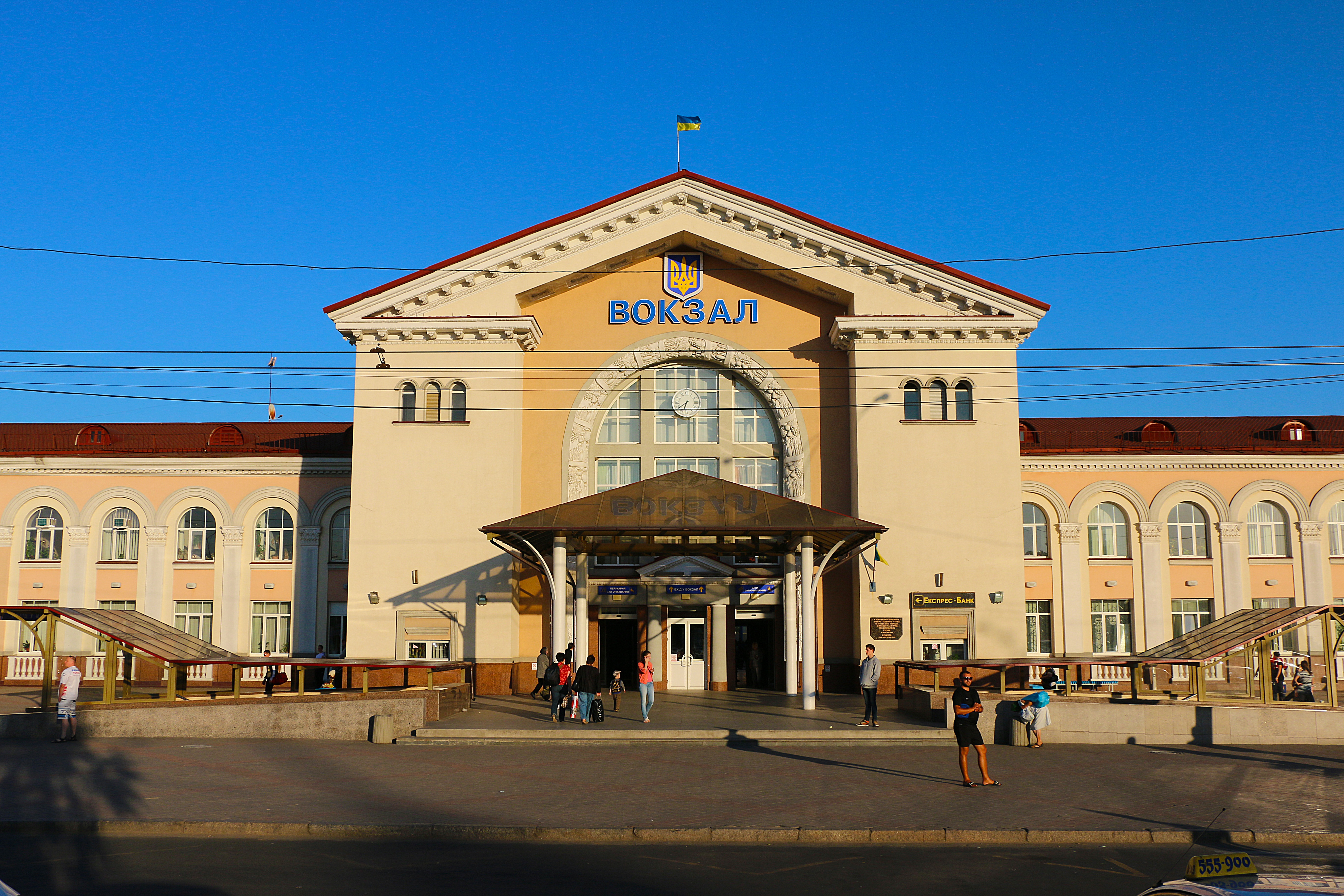 Залізничний вокзал, Вінниця, площа Привокзальна,1